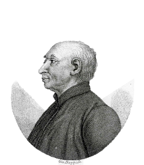 Luigi Lanzi (1732-1810)